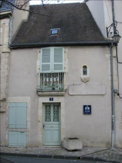 Située à Nevers, c'est la maison où habita Adam Billaut (poète, 1602 - 1662).